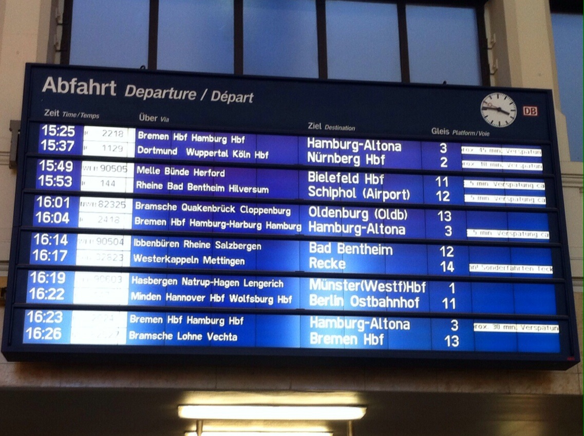 Abfahrtsanzeige im Osnabrücker Hauptbahnhof zur Sonderfahrt der Tecklenburger Nordbahn.